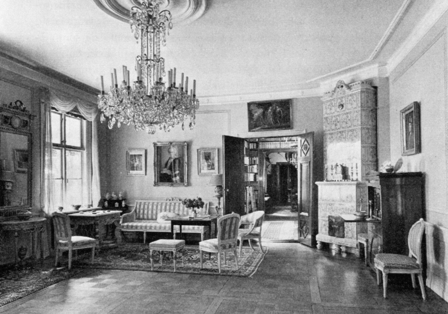 Edeby gård Ripsa socken, salongen